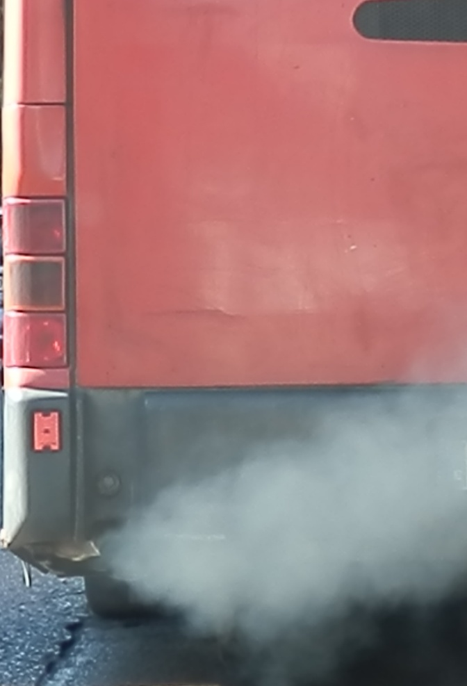 Humo diesel saliendo del tubo de escape de un autobús.